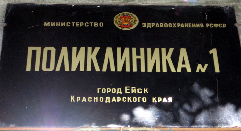 Табличка поликлиники №1 в Ейске